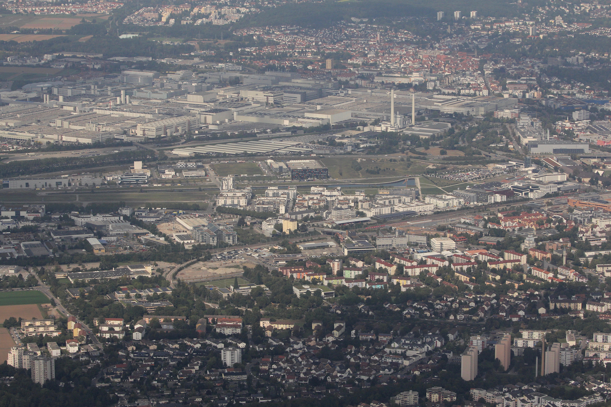 Ansicht des Stadtteils Flugfeld aus einem landenden Flugzeug